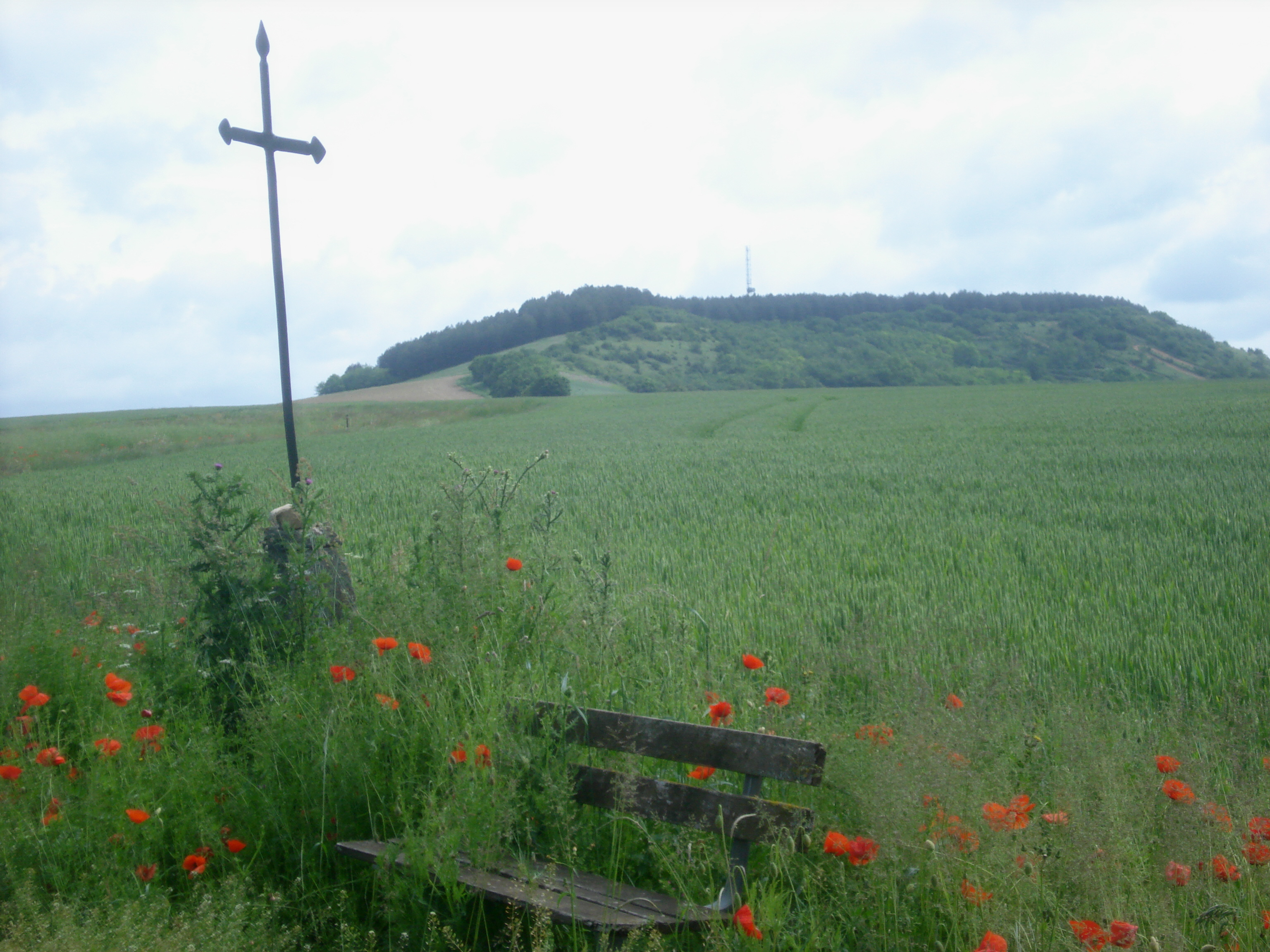 Varzy (Nièvre (Fr), Mont Charlay vu du sud-est. On aperçoit une partie du parcours de motocross sur la droite. Le Mont Charlay (358 m d'altitude) se trouve à 2,5 km au nord-est de Varzy, à l'est de la N151 (à droite dans le sens Varzy - Villiers-le-Sec).